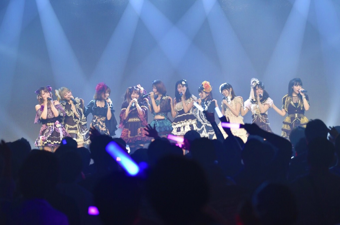 アイドルグループ「虹色幻想曲 〜プリズム・ファンタジア〜」